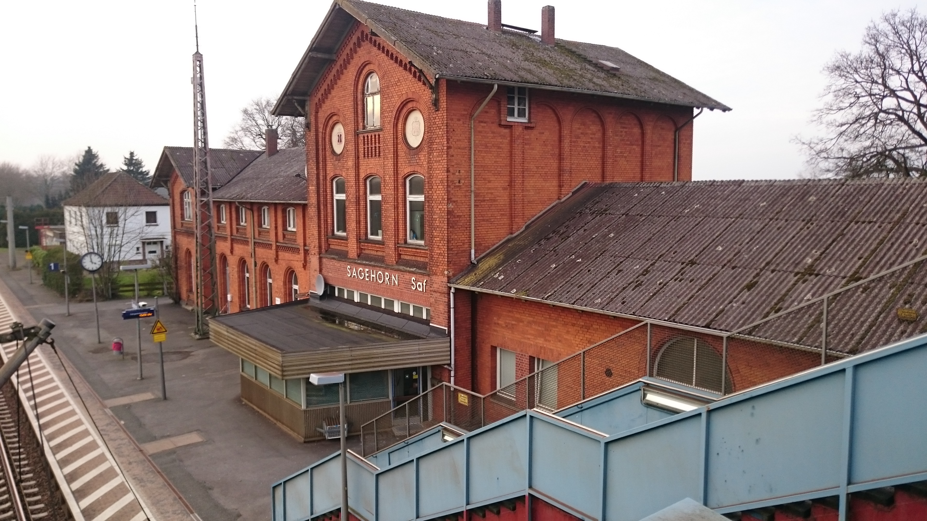 Bahnhof Sagehorn, Blick aufs Bahnhofsgebäude, von der Fußgängerbrücke, die zu Gleis 2/3 führt, aus